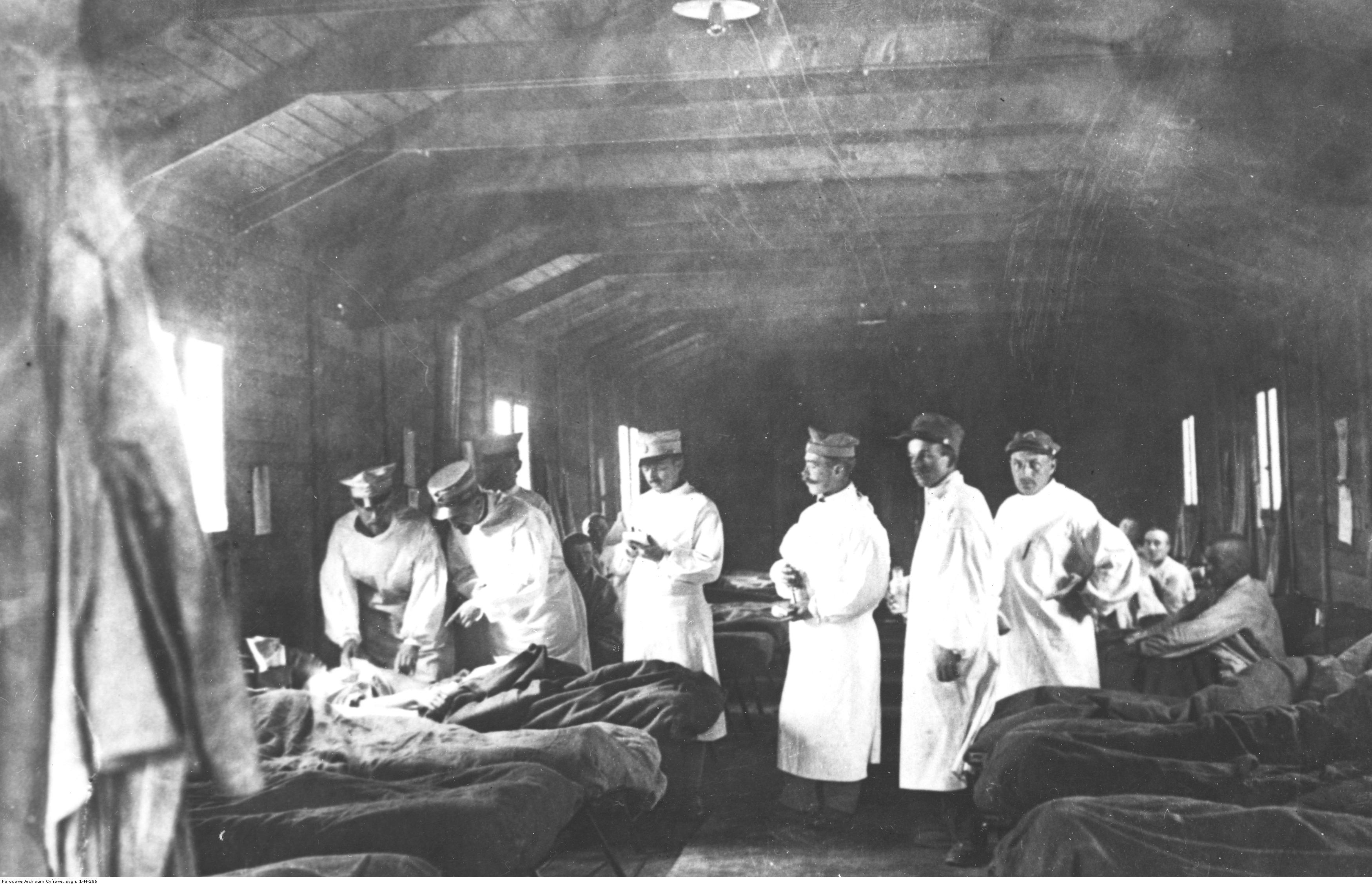 Polski obóz wojskowy w La Mandria di Chivasso - lekarze doglądający chorych w szpitalu; 1919 r. Koncern Ilustrowany Kurier Codzienny - Archiwum Ilustracji. Sygnatura: 1-H-286